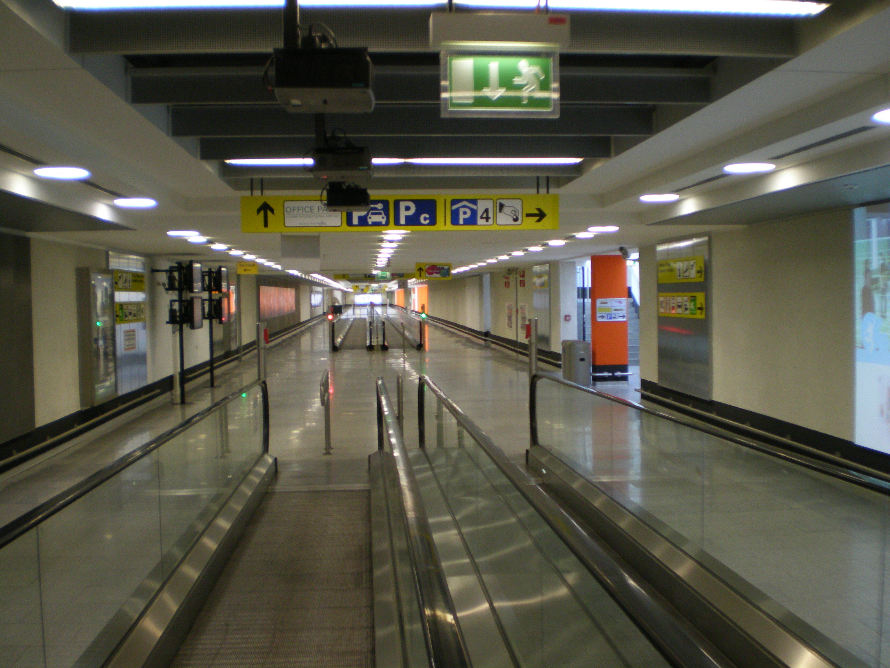 Die unterirdische Zugangspassage zu Parkhaus 4, Parkplatz C und zum Office Park.